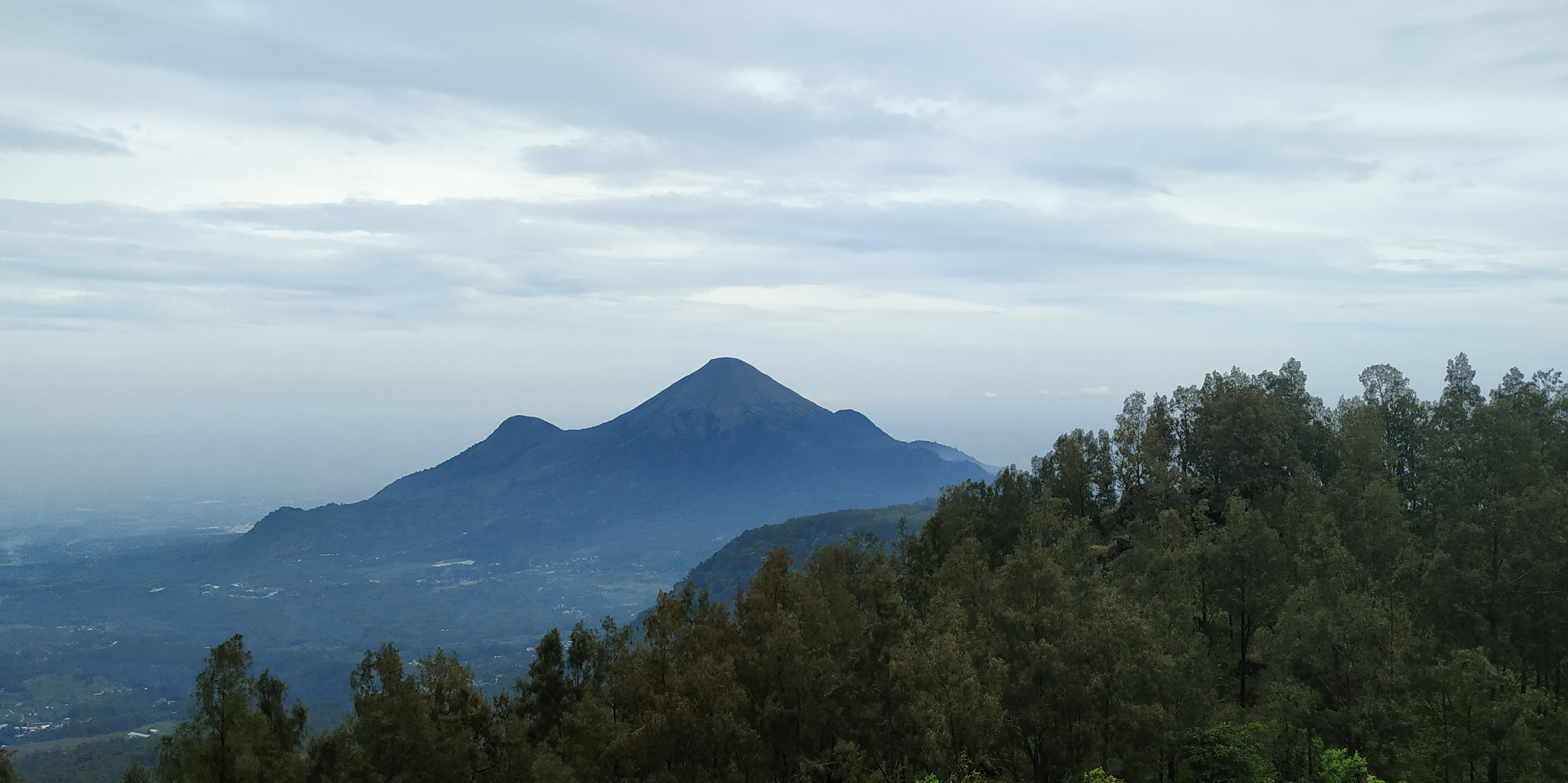 Penanggungan from Arjuno-Welirang 2018-12-30